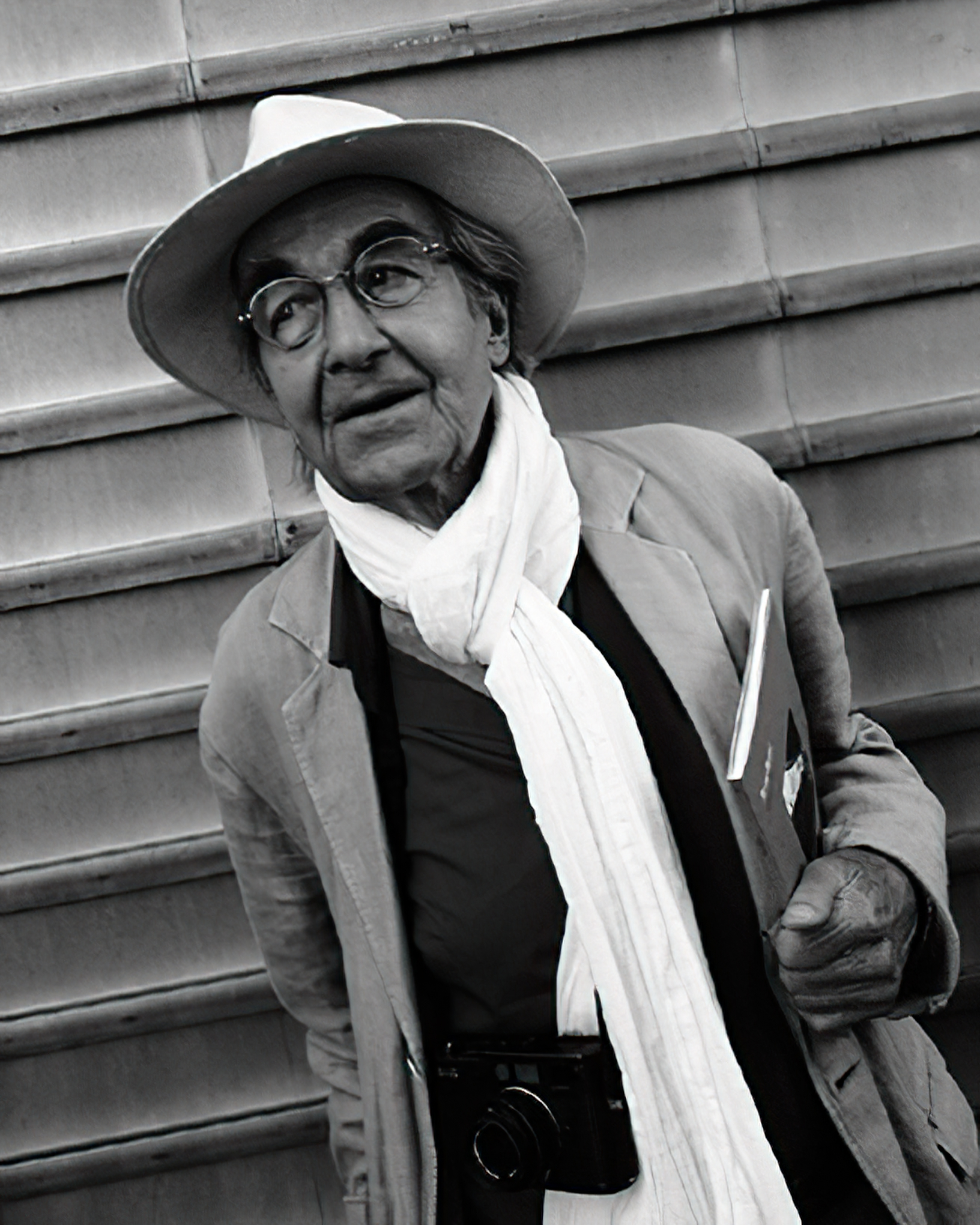 René Burri (2010), photographe